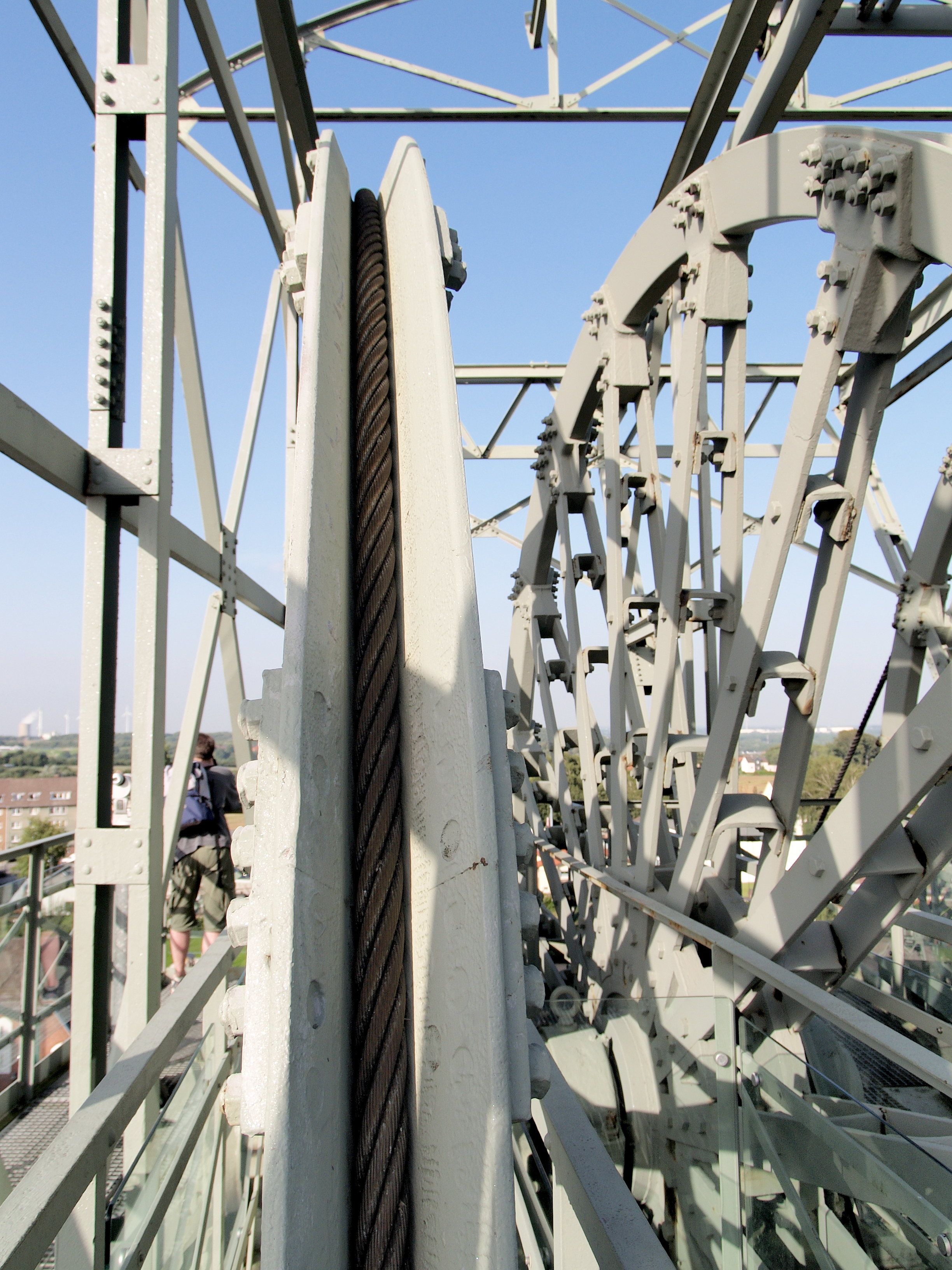 Förderseil in der Seilscheibe auf der Zeche Zollern in Dortmund, Germany